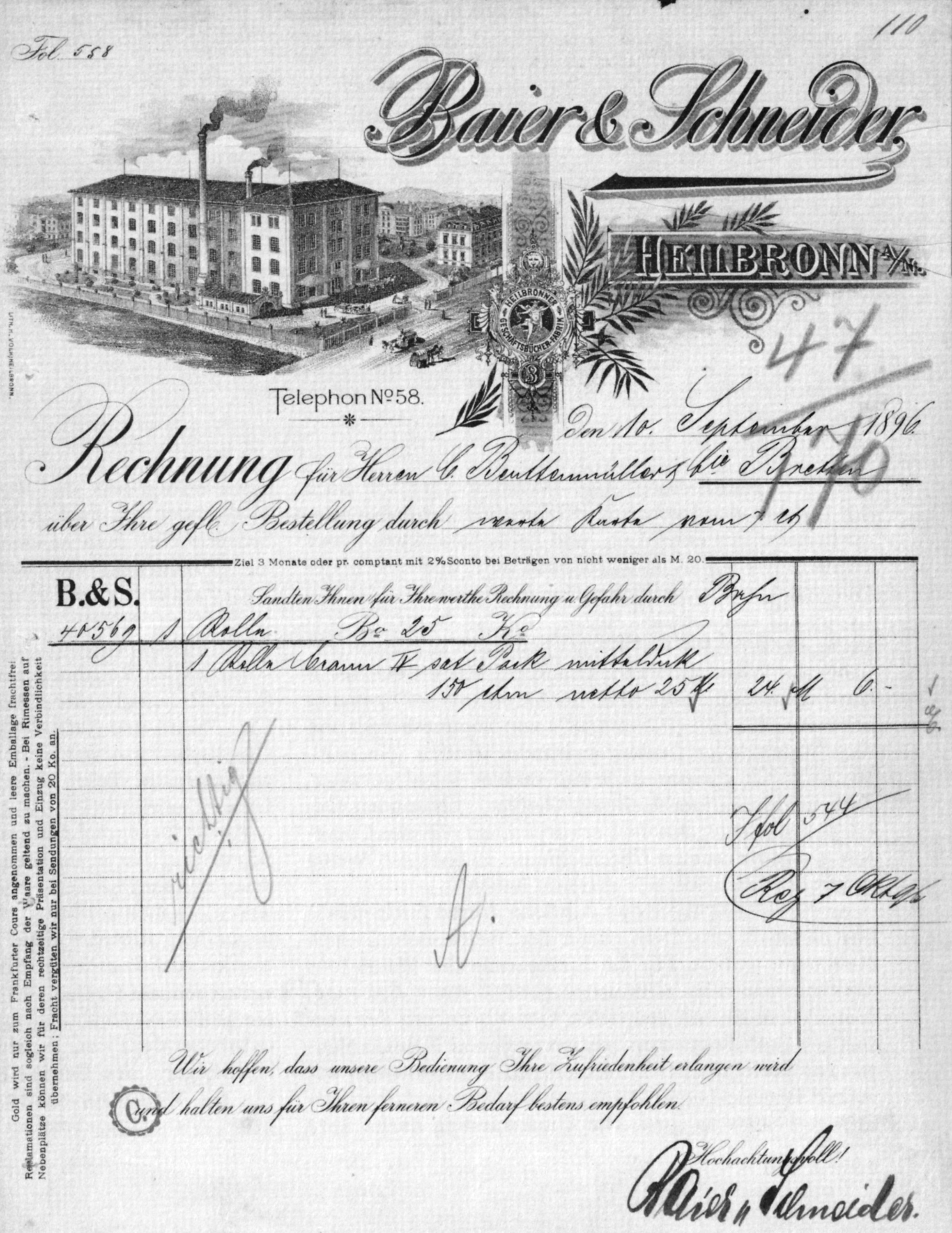 Rechnung des Heilbronner Papierherstellers Baier & Schneider mit Lithographie des Unternehmensgebäudes im Kopf